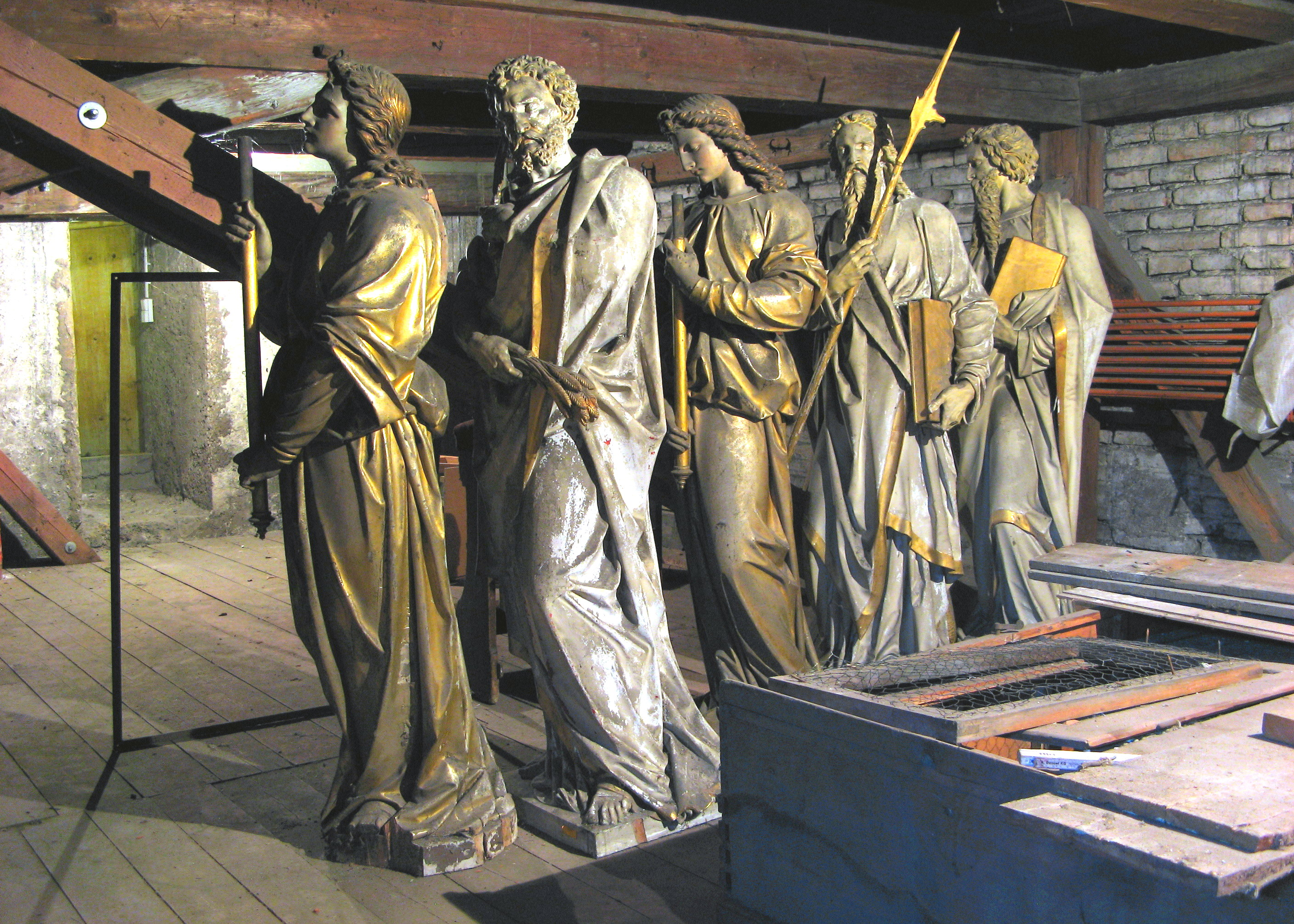 Deponierte Apostelstatuen in St. Georg, Augsburg, von Josef Beyrer